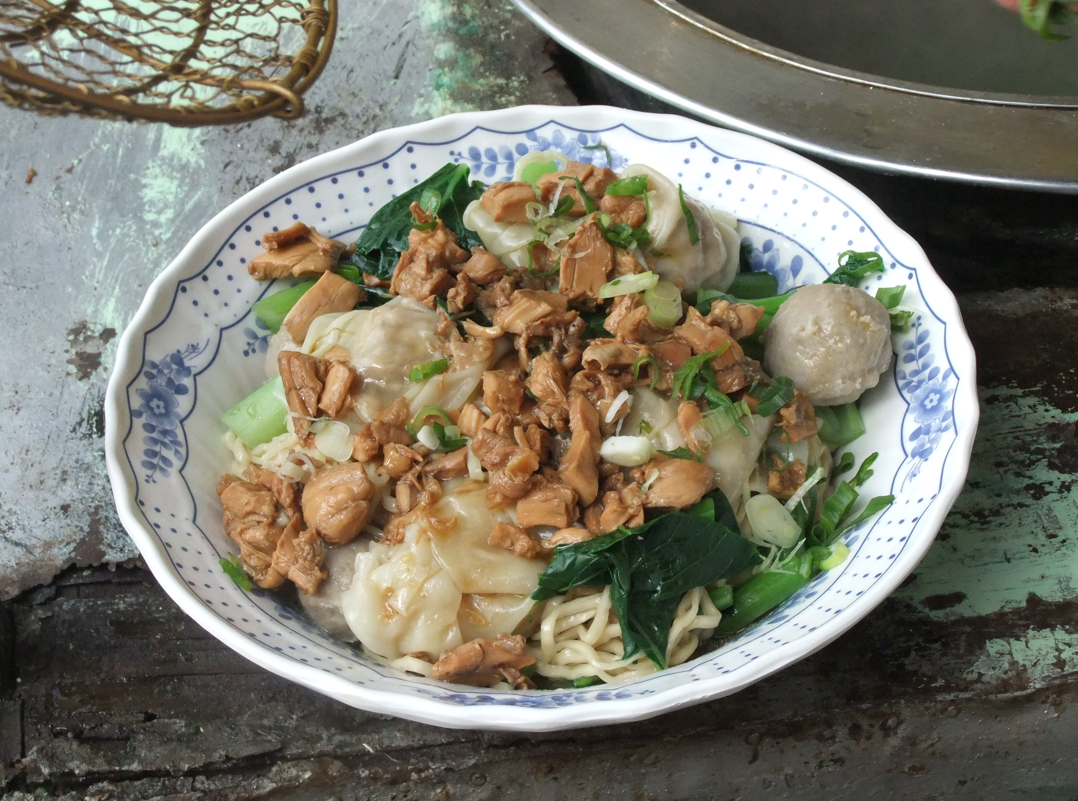 Mi bangka keliling